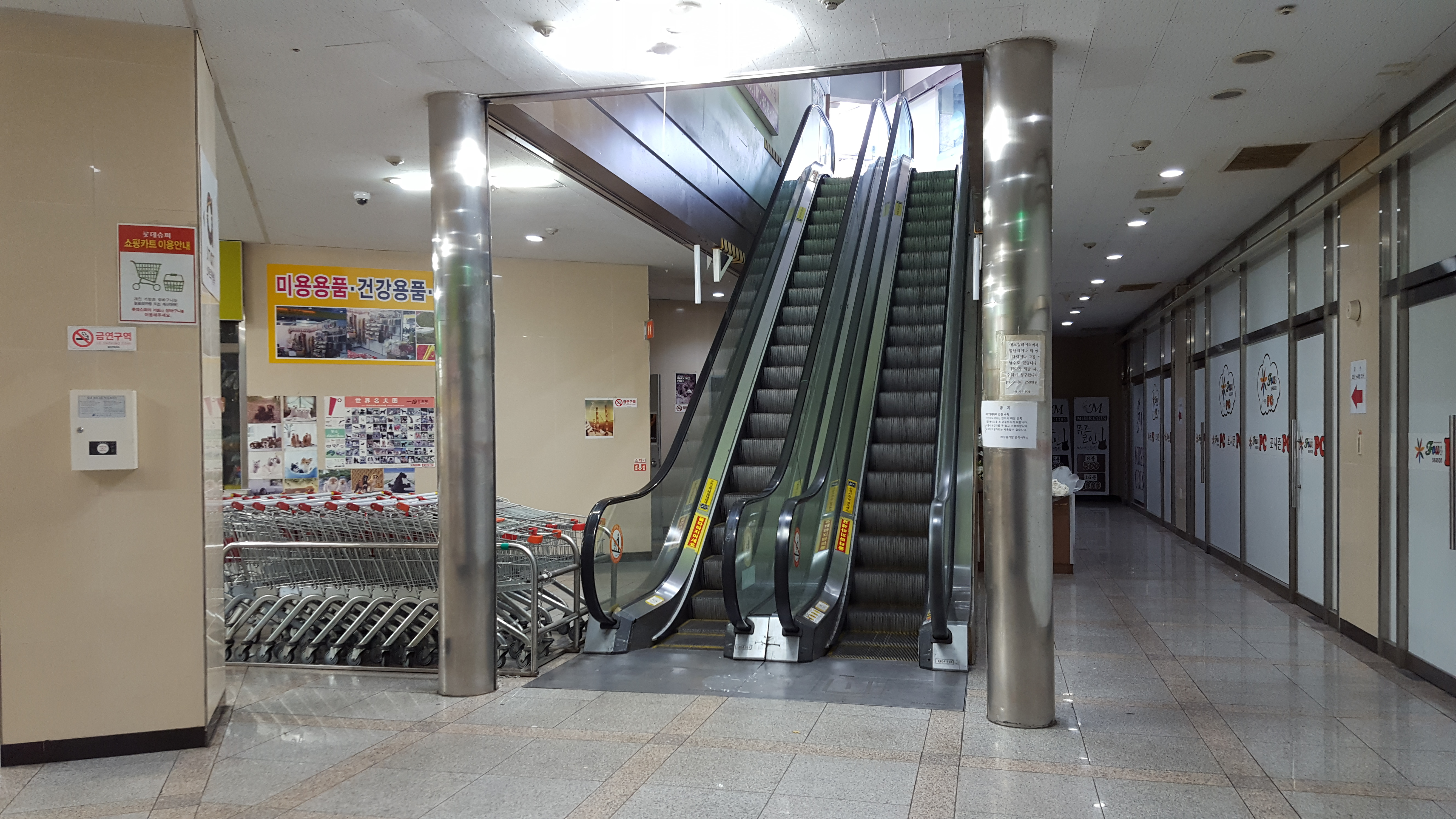 서울 강서구 PC방 살인사건이 발생한 장소